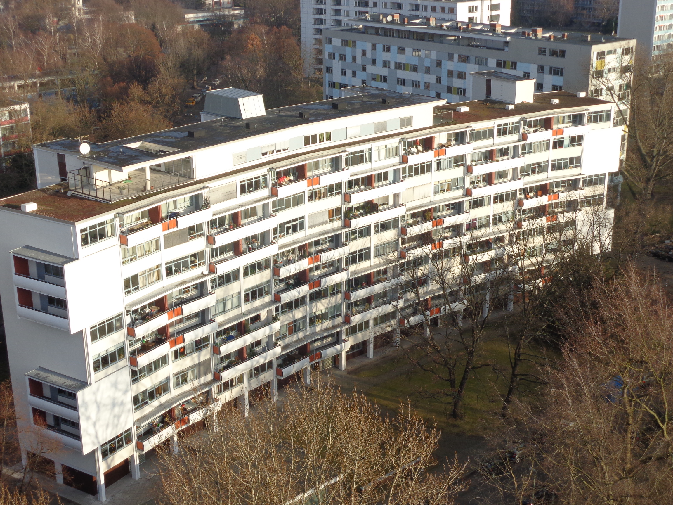 Zeilenbau von Walter Gropius im Großen Tiergarten